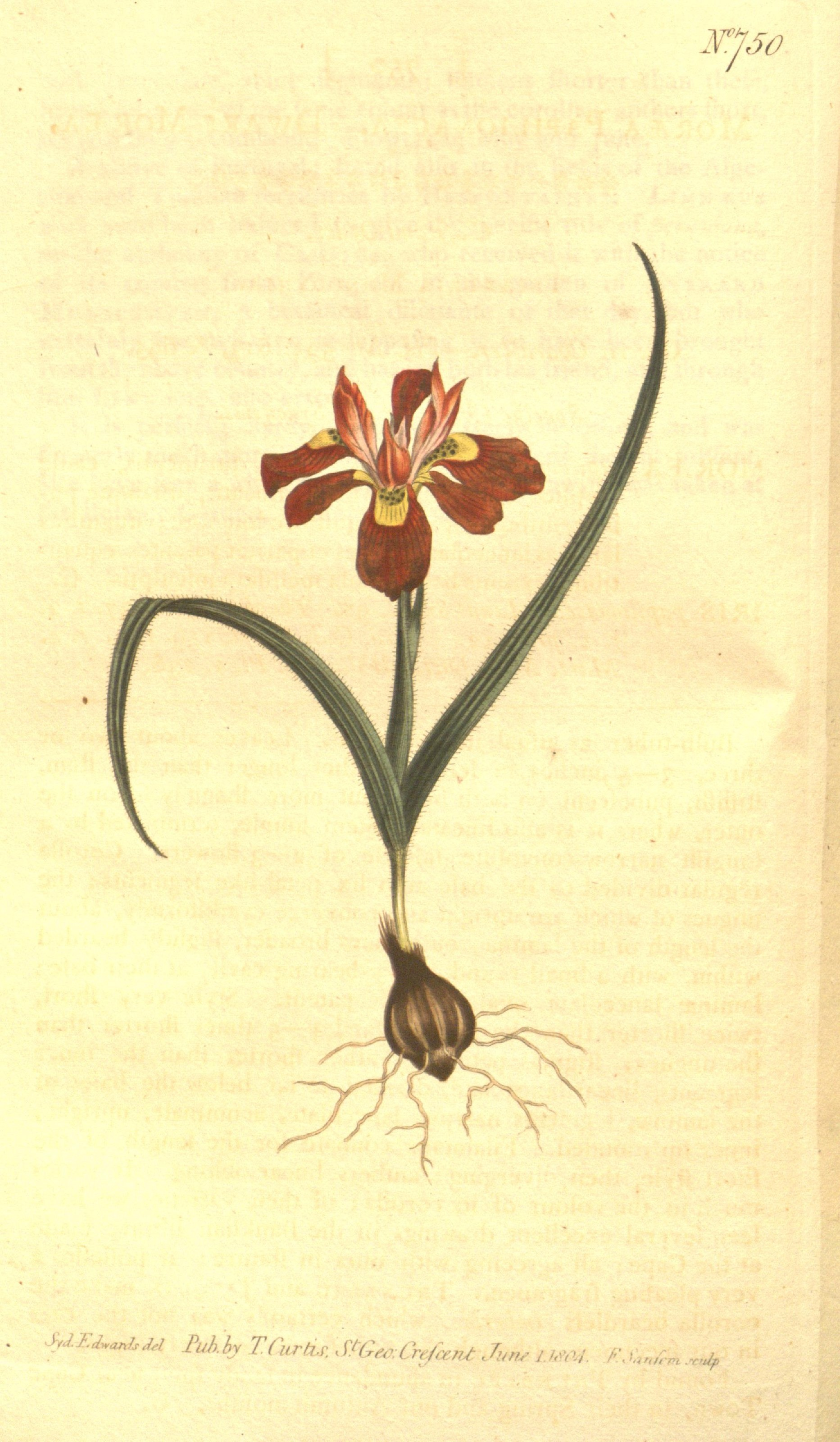 Wj/50 fukh T.t